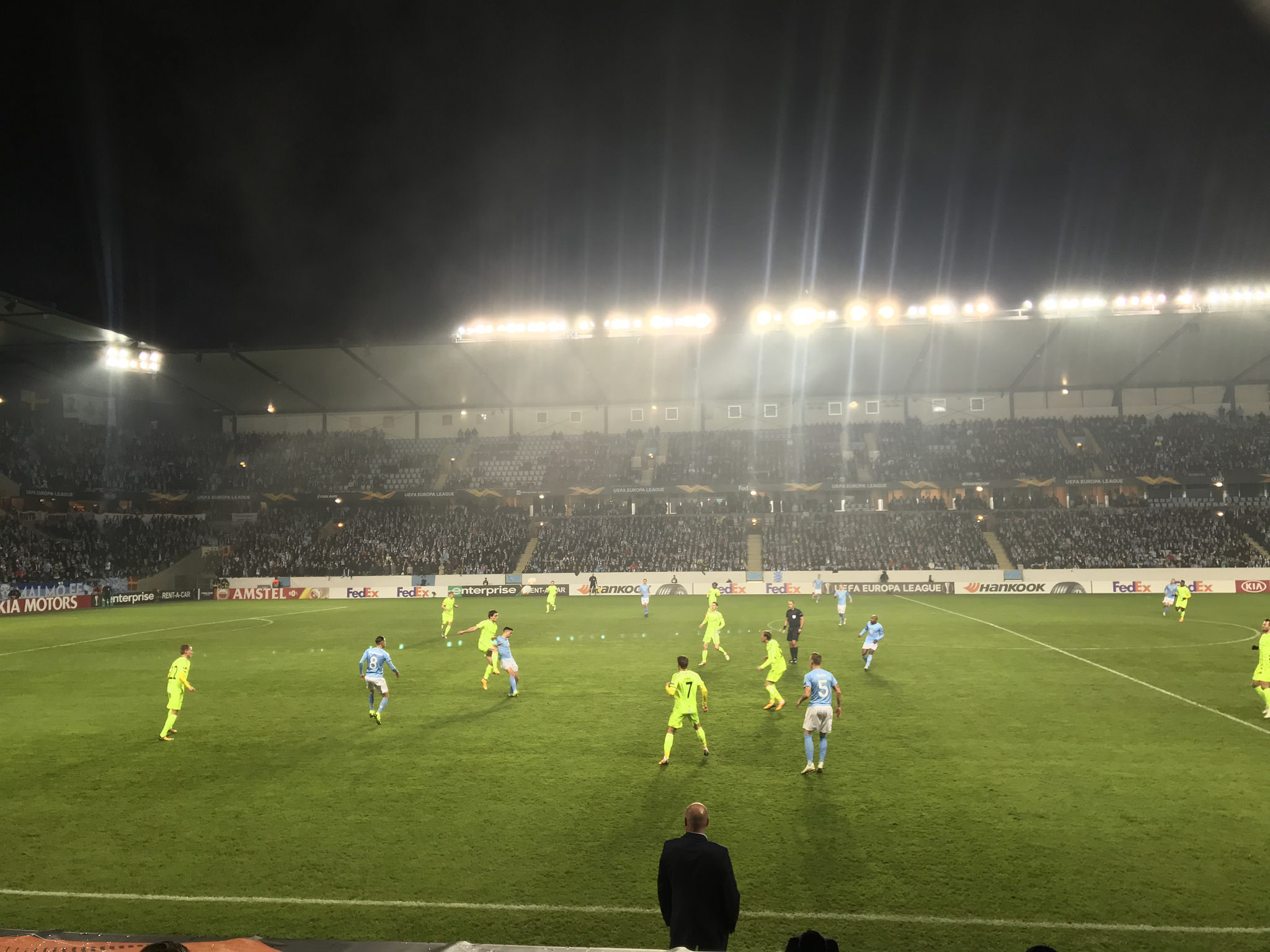 Match mellan Malmö FF och Sarpsborg 08 på Stadion i Malmö i Uefa Europa League 2018/19